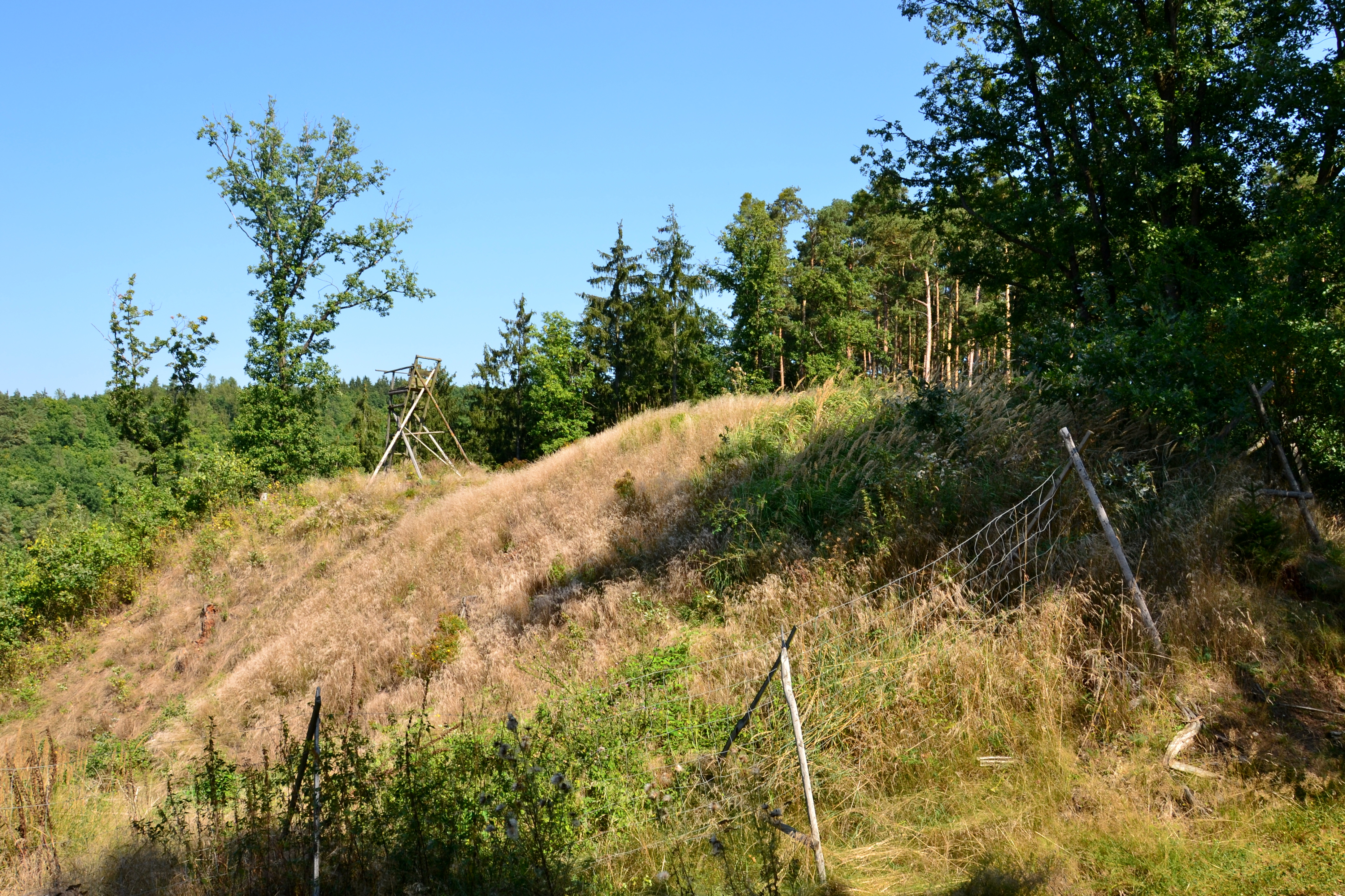 Vnitřní strana valu akropole